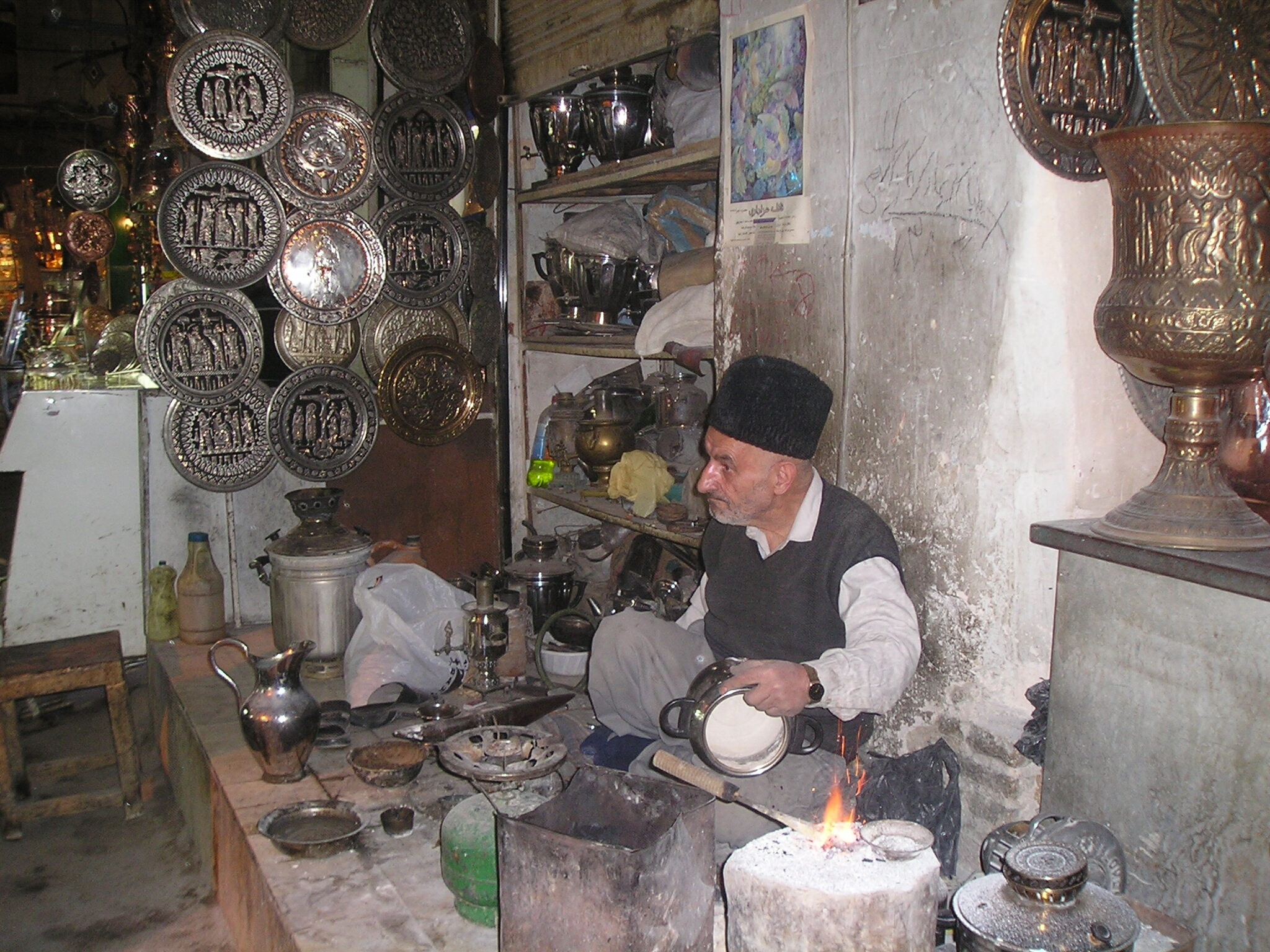 Market of Esfahan, Iran, 2004. Photo by Bertil Videt